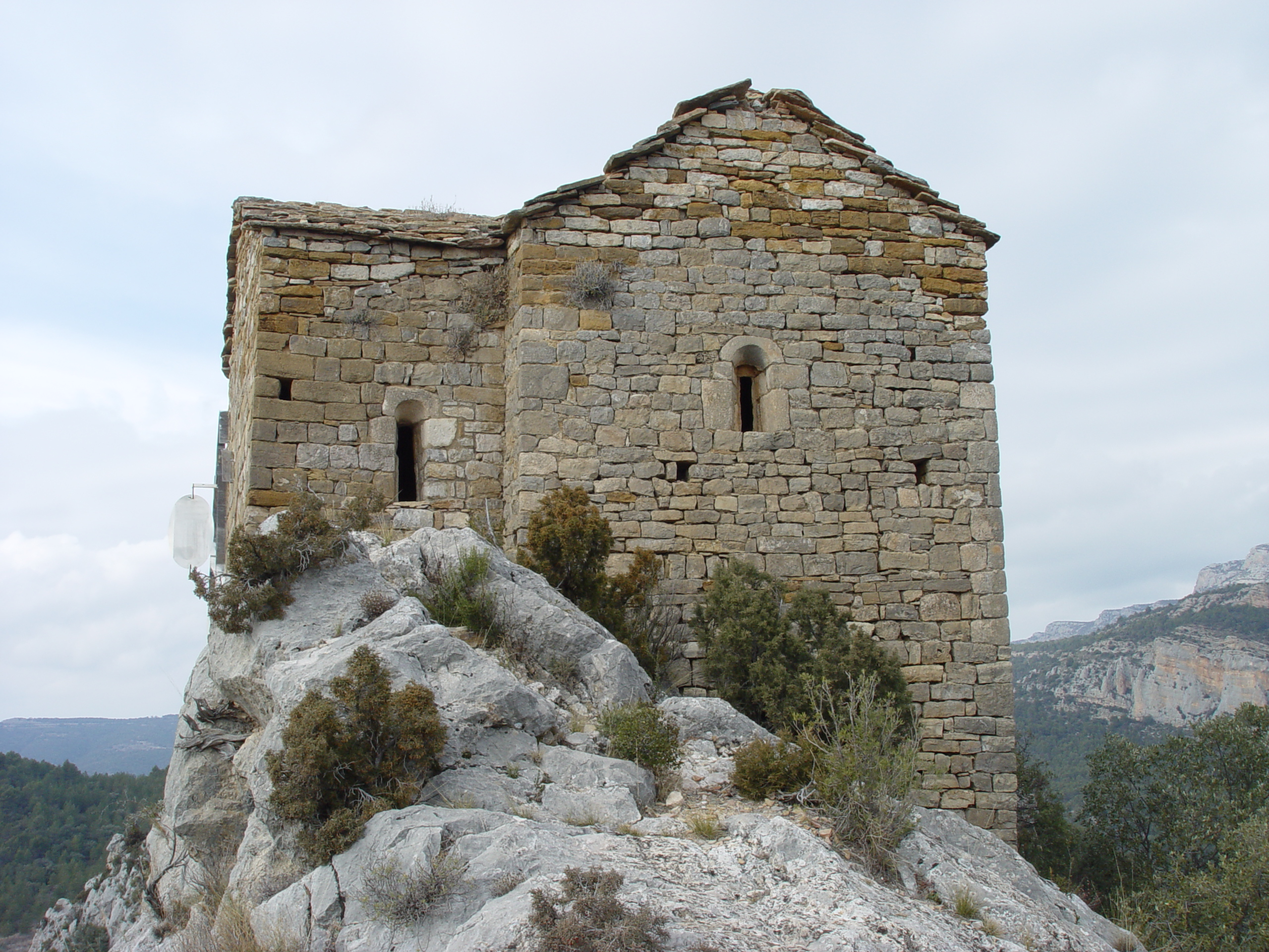 Ermita_de_Santa_Quitèria_i_Sant_Bonifaci_de_Montfalcó_de_la_Ribagorça